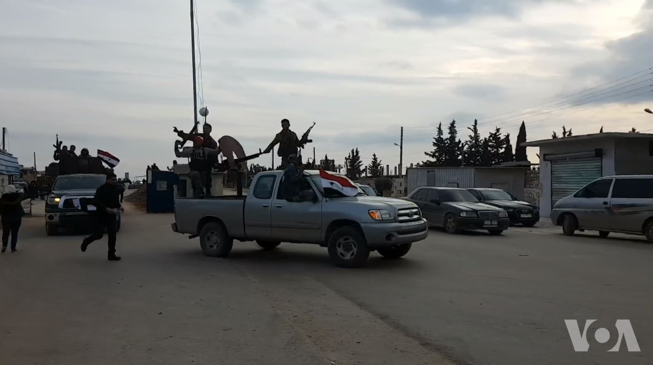 Entrée de milices pro-régime syriennes à Afrine le 20 février 2018.